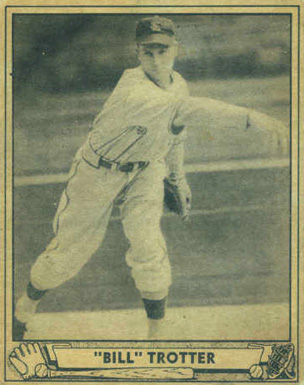 Bill Trotter